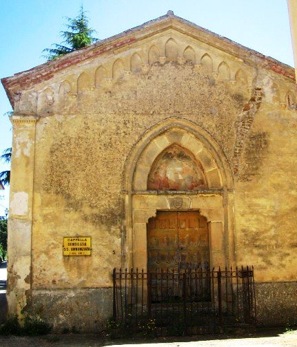 Chiesa di juspatronato dei del Mercato Baroni di Giungano e Convingenti, di Rutino e Monteforte , della Foresta del Cilento, del Mercato del Cilento di s. Lorenzo in Laureana, del de' Mattarellis etc